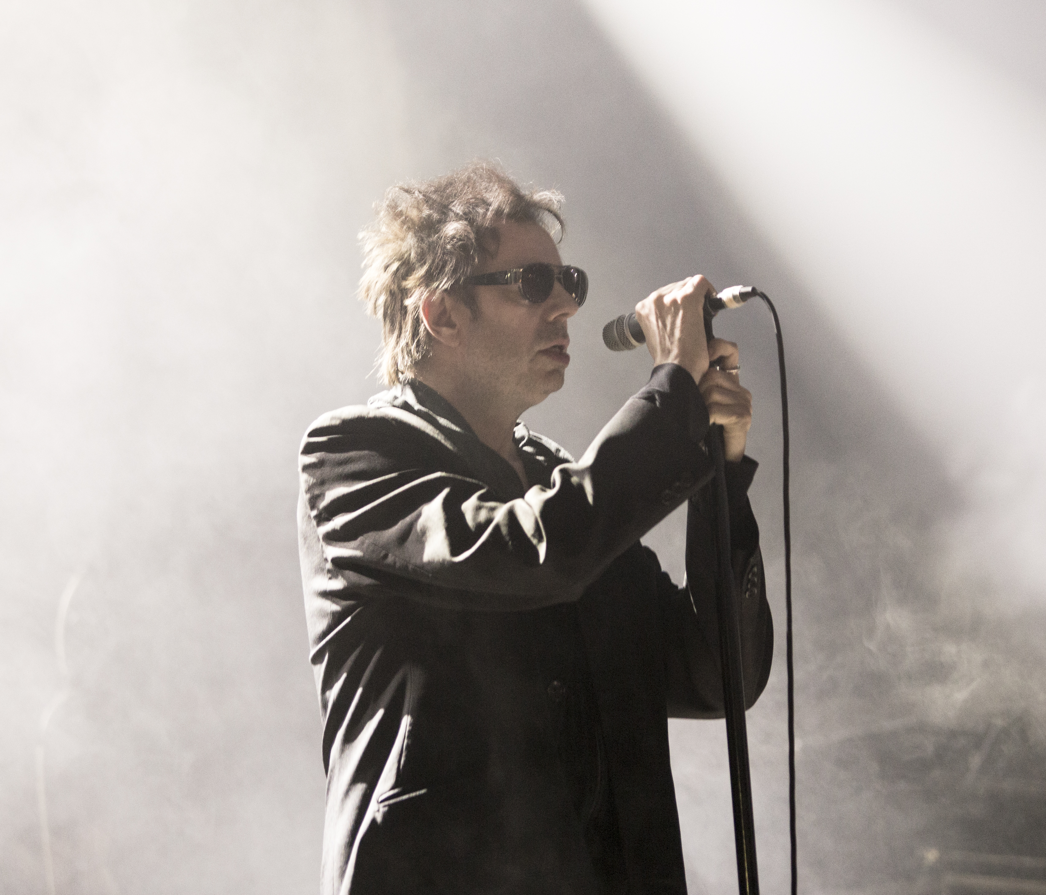 FIB 2016